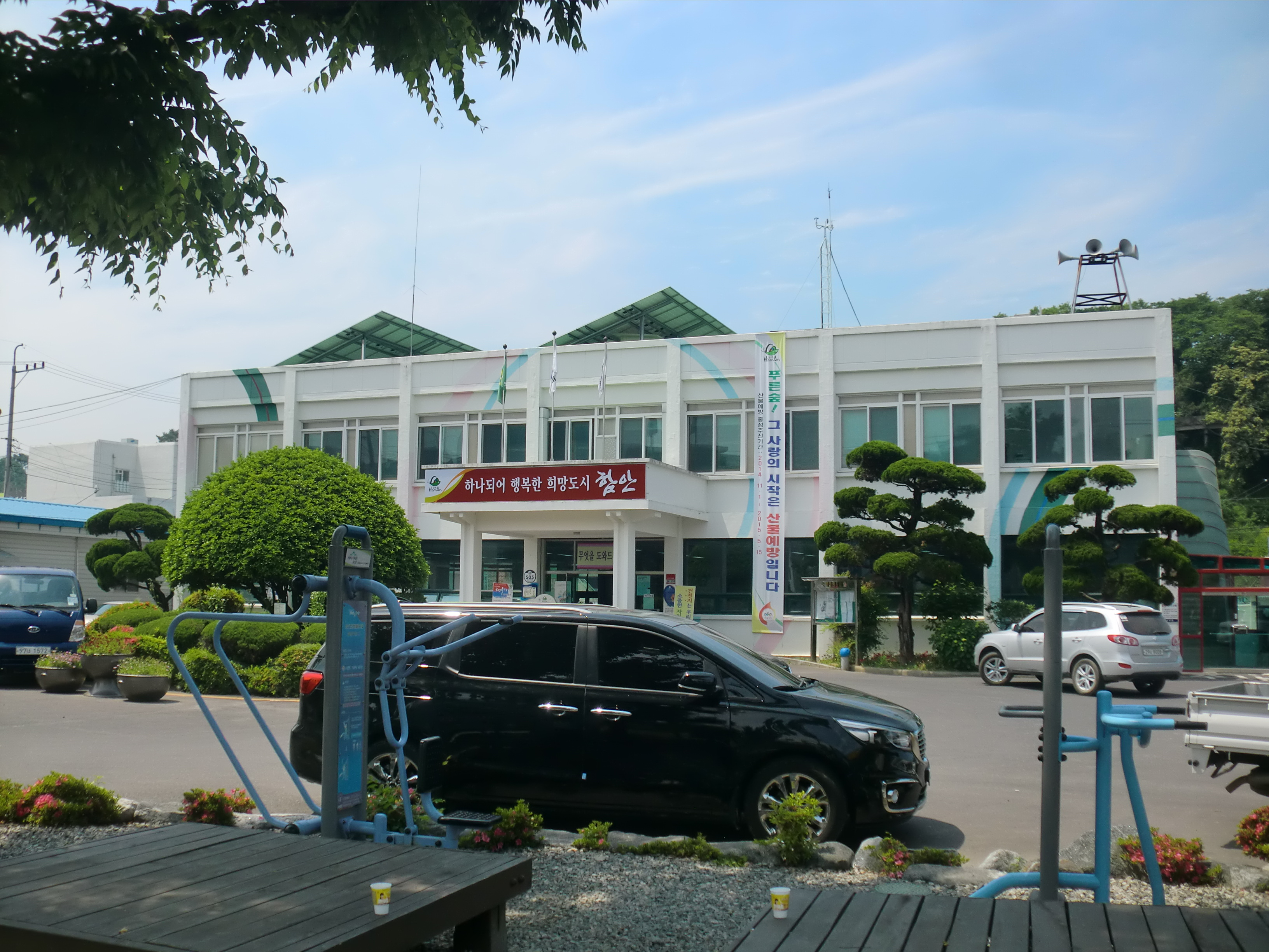 경상남도 함안군에 있는 가야읍사무소